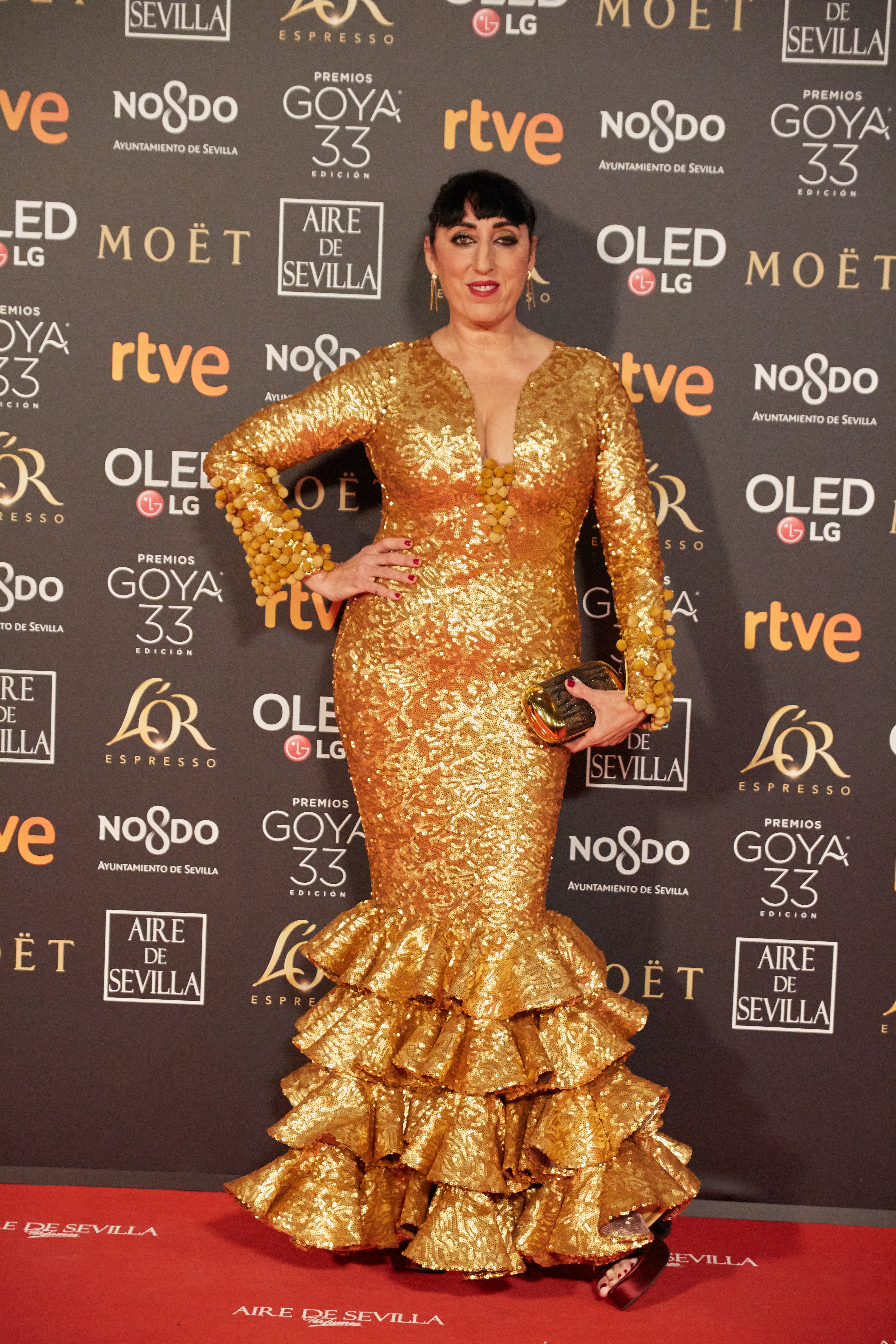 Rossy de Palma en la alfombra roja de los Premios Goya celebrados en Sevilla en Febrero 2019